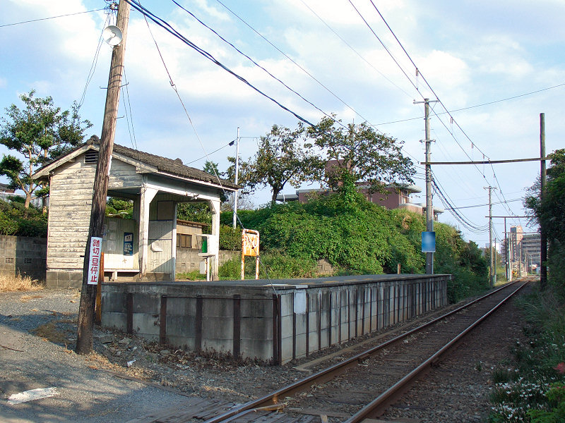 熊本電気鉄道打越駅 奥が北熊本駅方面、手前が上熊本駅方面。 撮影者/著者/著作権保有者 : MK Products (本人がアップロード) 撮影日 : 2006/09/24 打越駅用にアップロードした画像です。良い画像があれば別の画像に変えてください。 この画像は一部にぼかしをかけています。